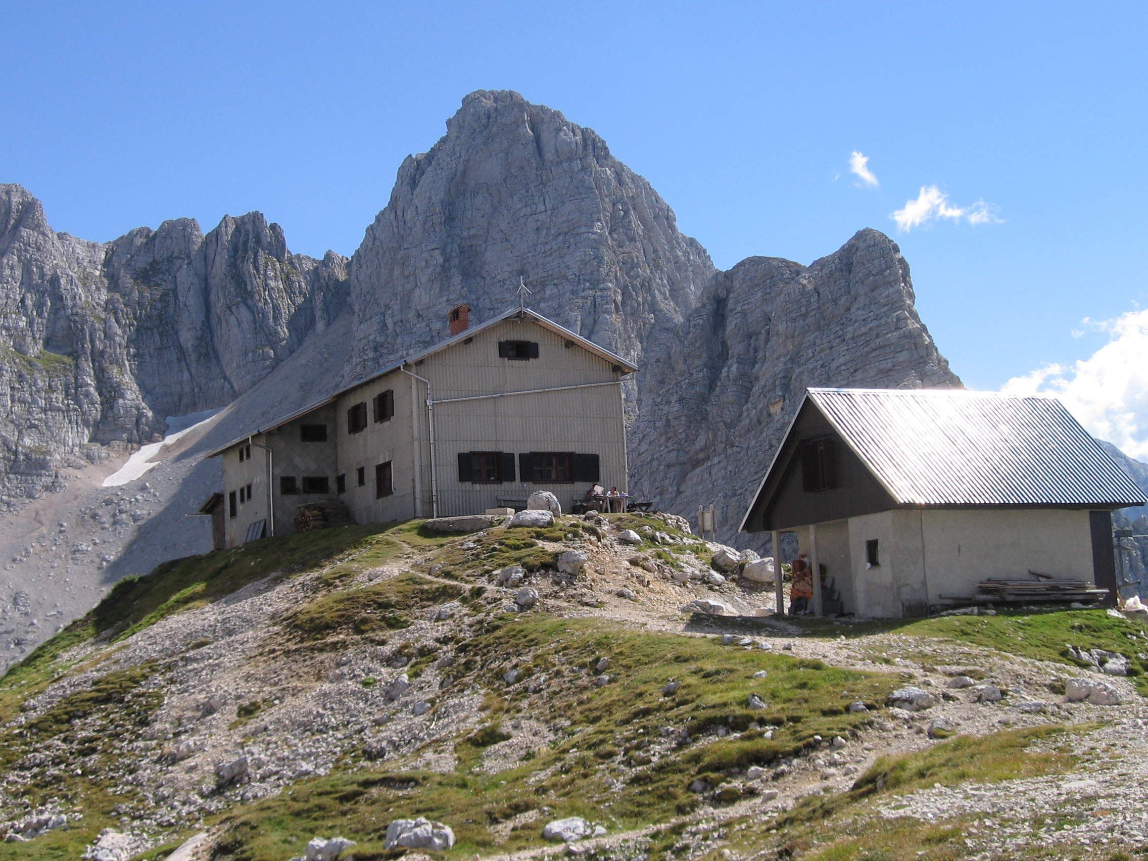 Jože Pogačnik's hut on Kriški podi, with mount Pihavec